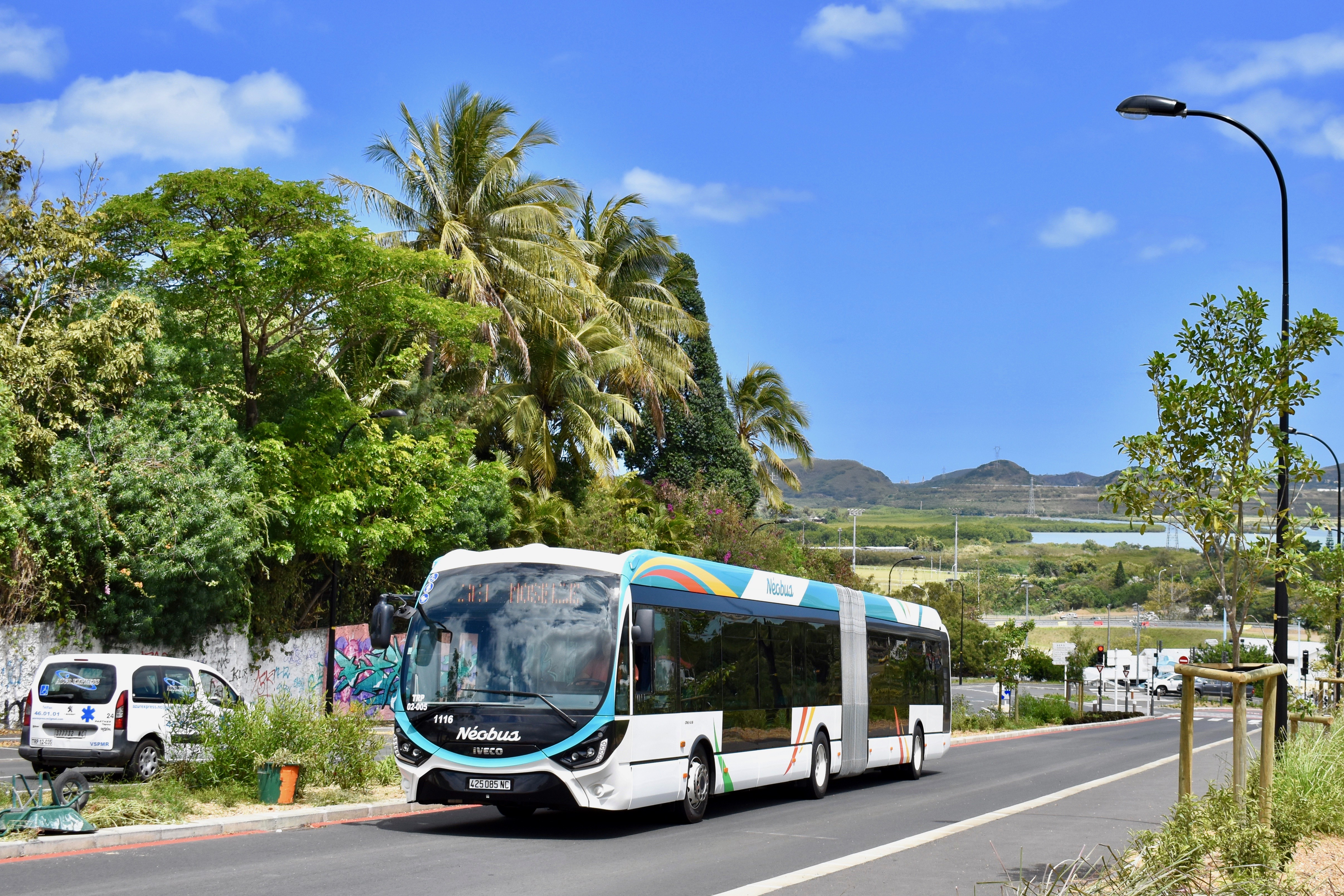 Véhicule sur la ligne Néobus arrivant à la mairie de Dumbéa et en direction de Nouméa.